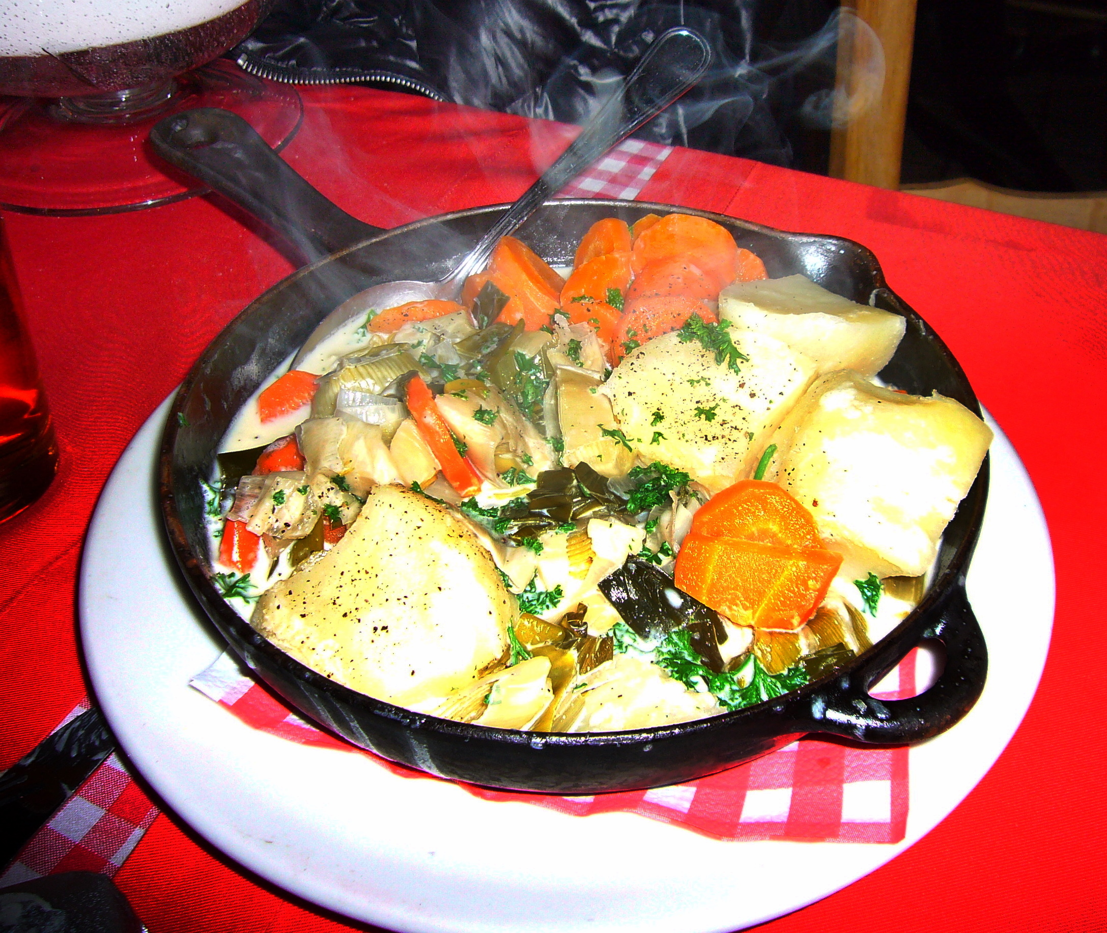 Excellent dinner!